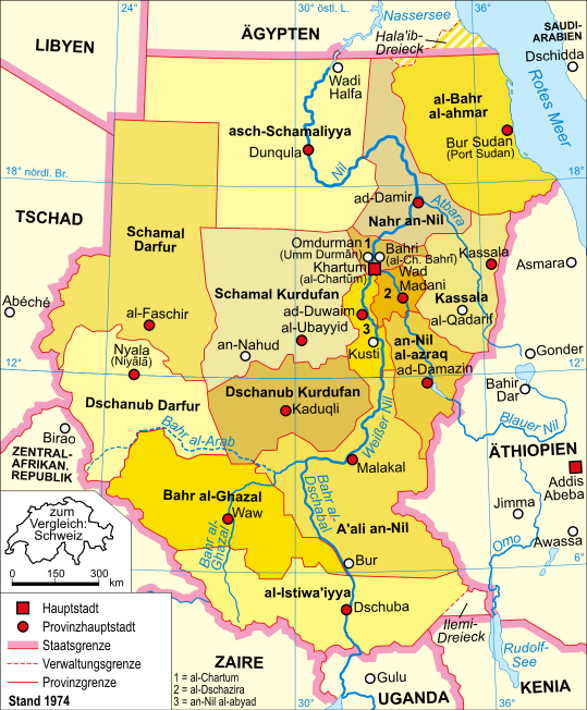 Politische Karte des Sudan (Stand 1974)